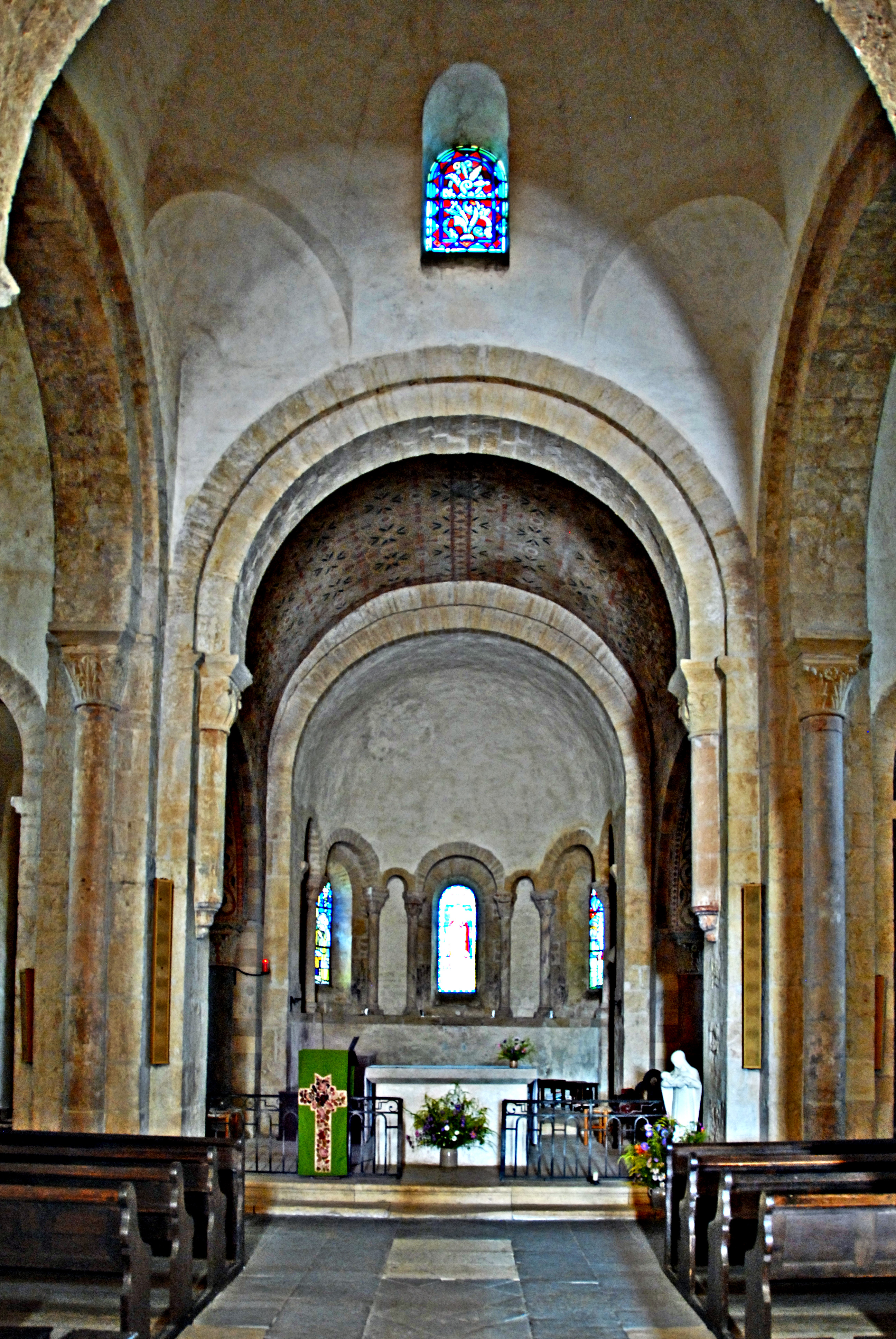 St-André d'Iguerande, Vierung und Chor